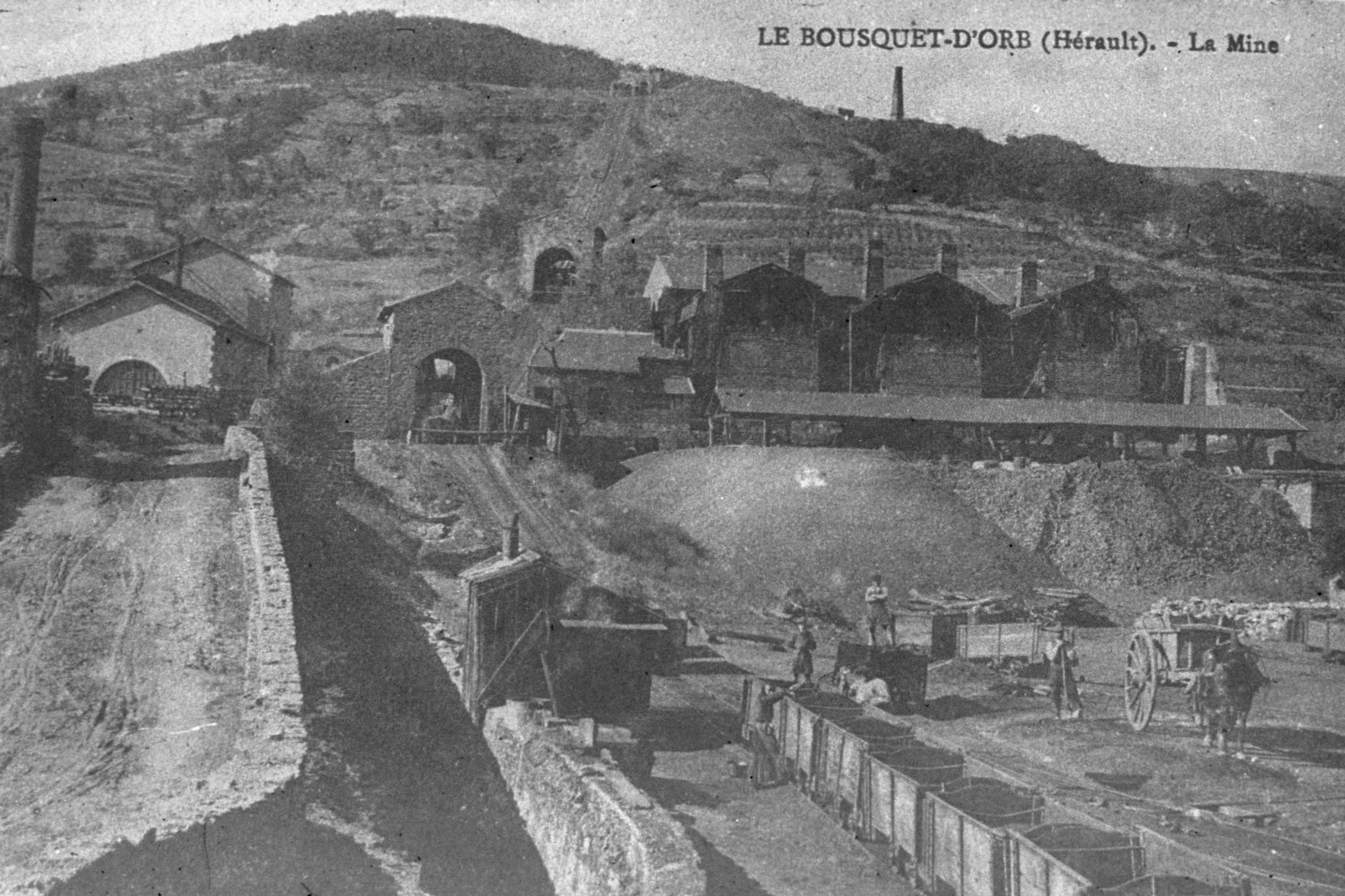 Le Bousquet-d'Orb. - La Mine : reproduction photographique d'une carte postale ancienne.